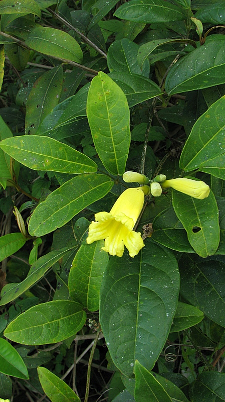 Adenocalymma coriaceum A.DC.